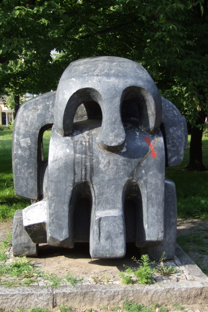 Das Mahnmal zur Erinnerung an das KZ Treblinka auf dem Amtsgerichtsplatz in Berlin-Charlottenburg Fotograf: Harald Rossa Datum: Juni 2006